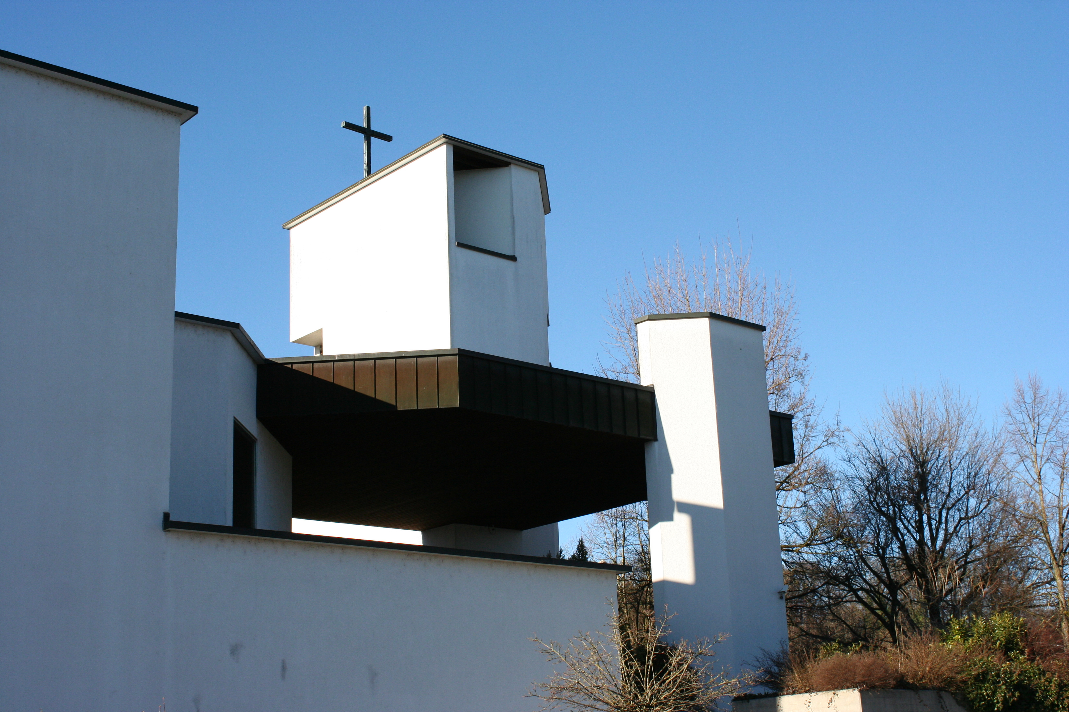 Römisch-katholische Pfarrikirche St. Niklaus Hombrechtikon, Detailansicht von Süden